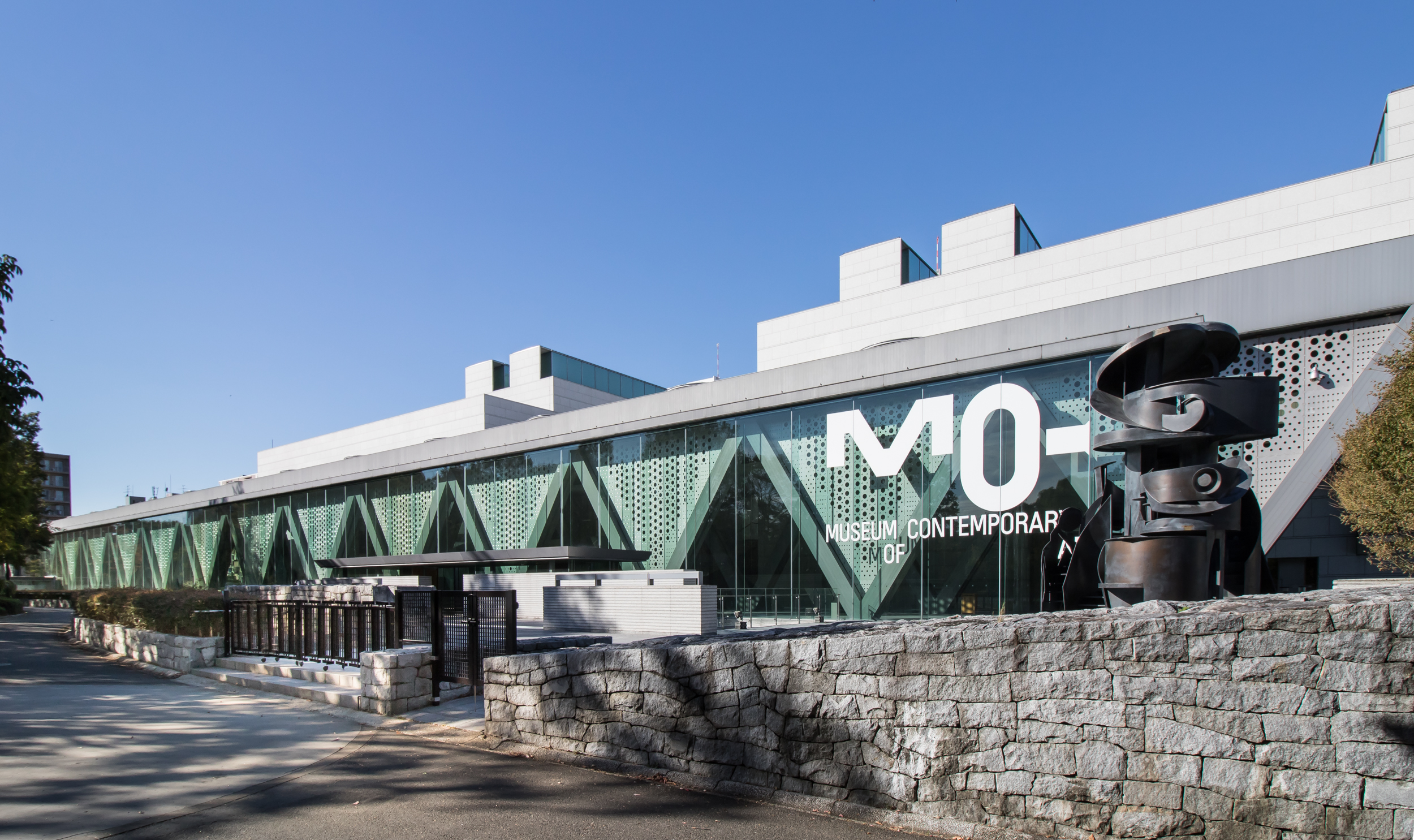 東京都現代美術館、東京都江東区。柳澤孝彦設計。